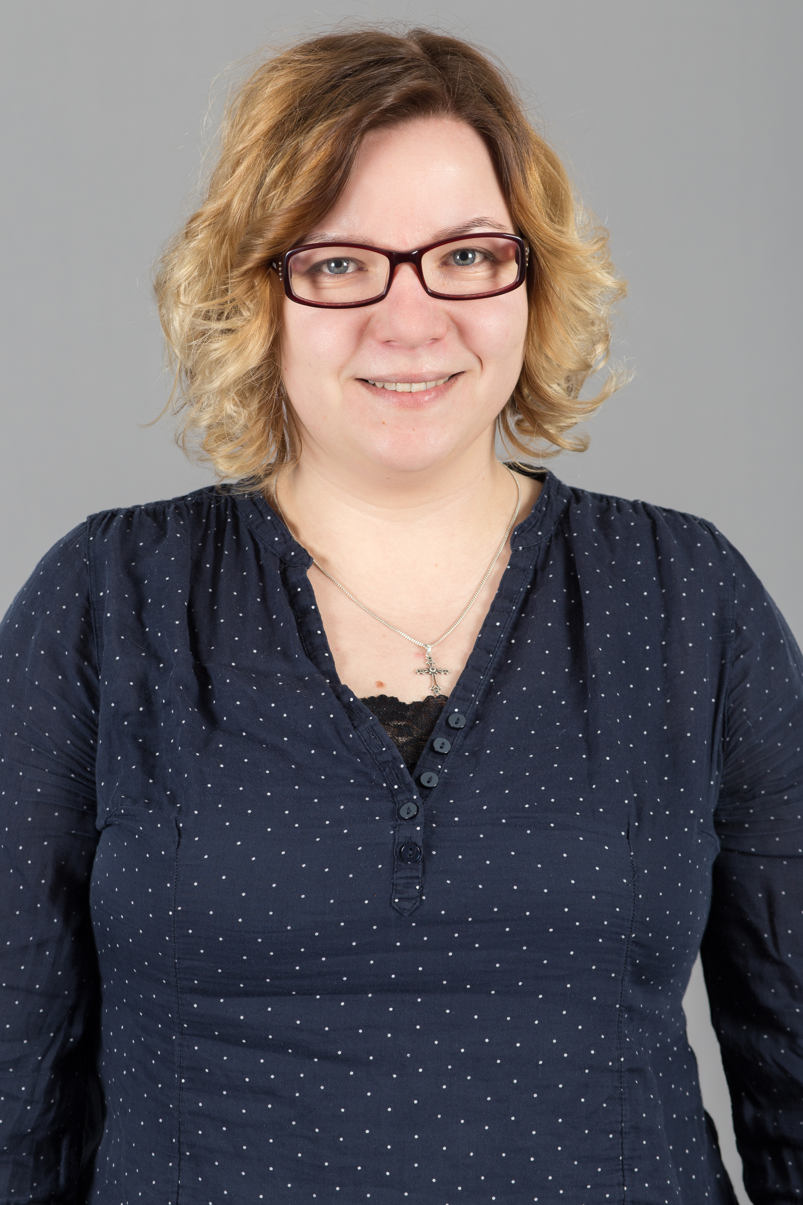 Katja Mitteldorf